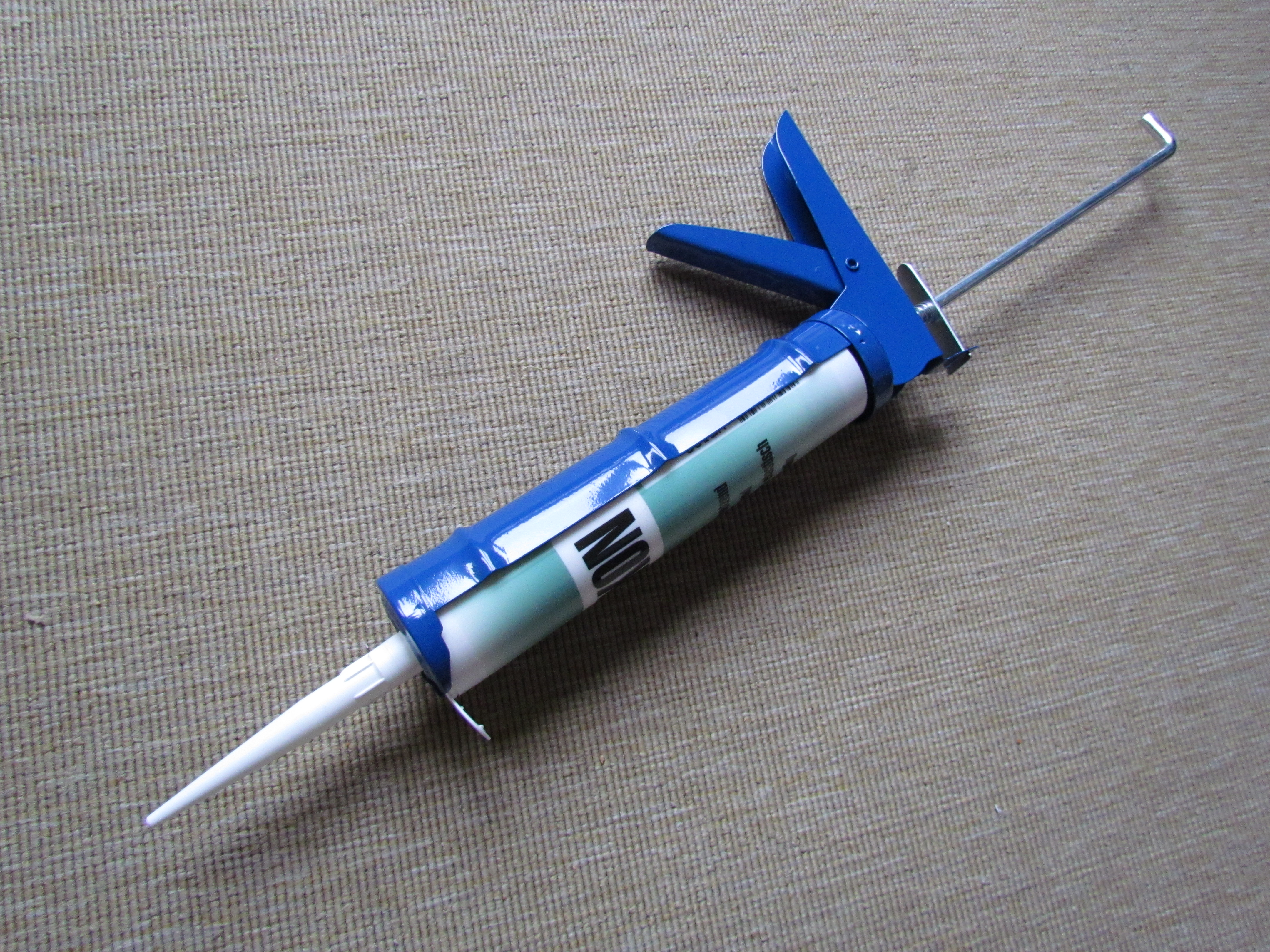 Bildinhalt: Blaue Silikonpistole mit Kartusche und Spitze Aufnahmeort: Mannheim, Deutschland